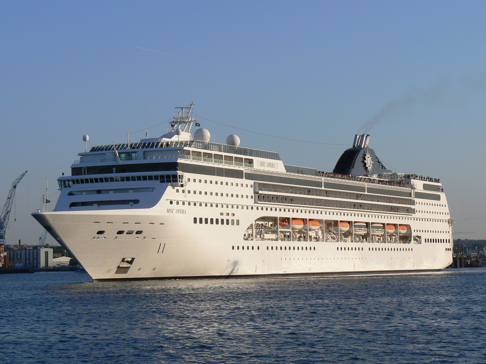 Kreuzfahrtschiff MSC Opera im Kieler Hafen. IMO Number: 9250464 MMSI Number: 357627000 Callsign: H3FV Length: 252 m Beam: 30 m